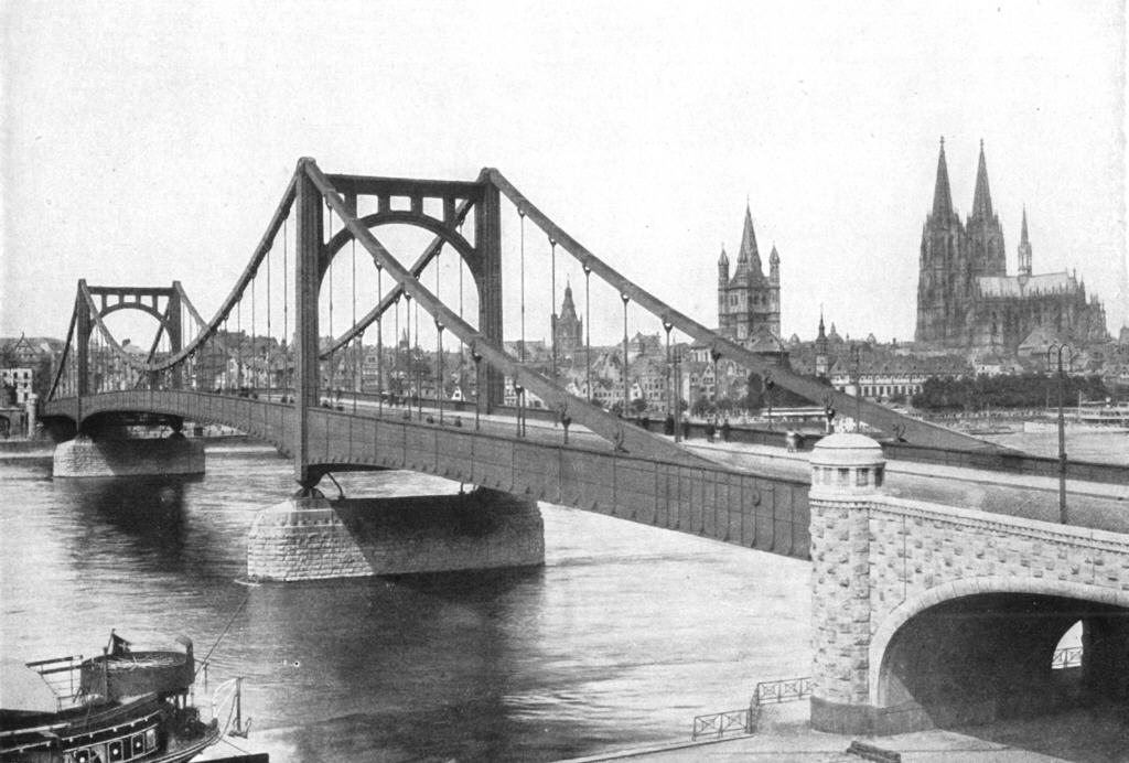 Hindenburgbrücke um 1925 (heutige Deutzer Brücke)